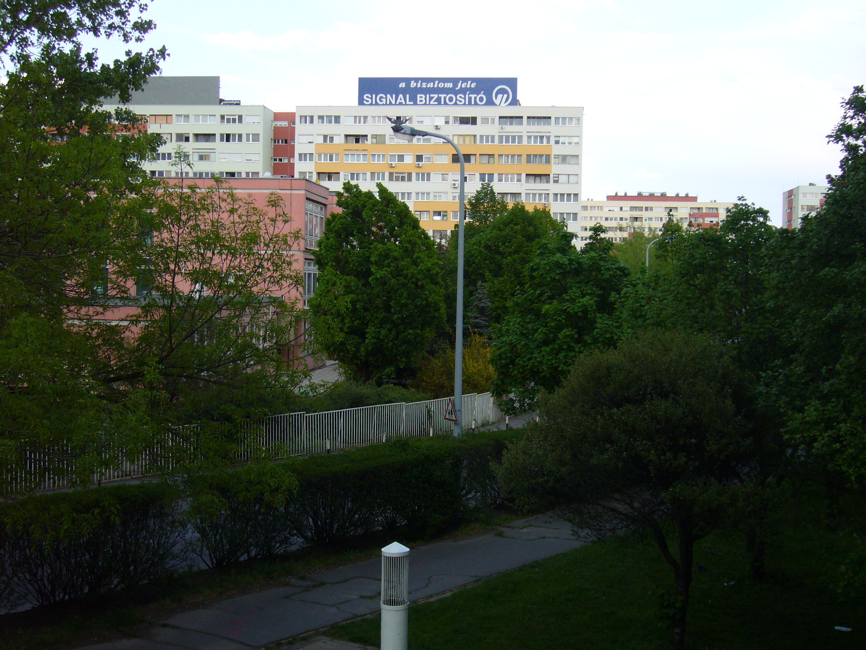 Őrmezei házak nyáron a Menyecske utcából fényképezve (Budapest XI.)